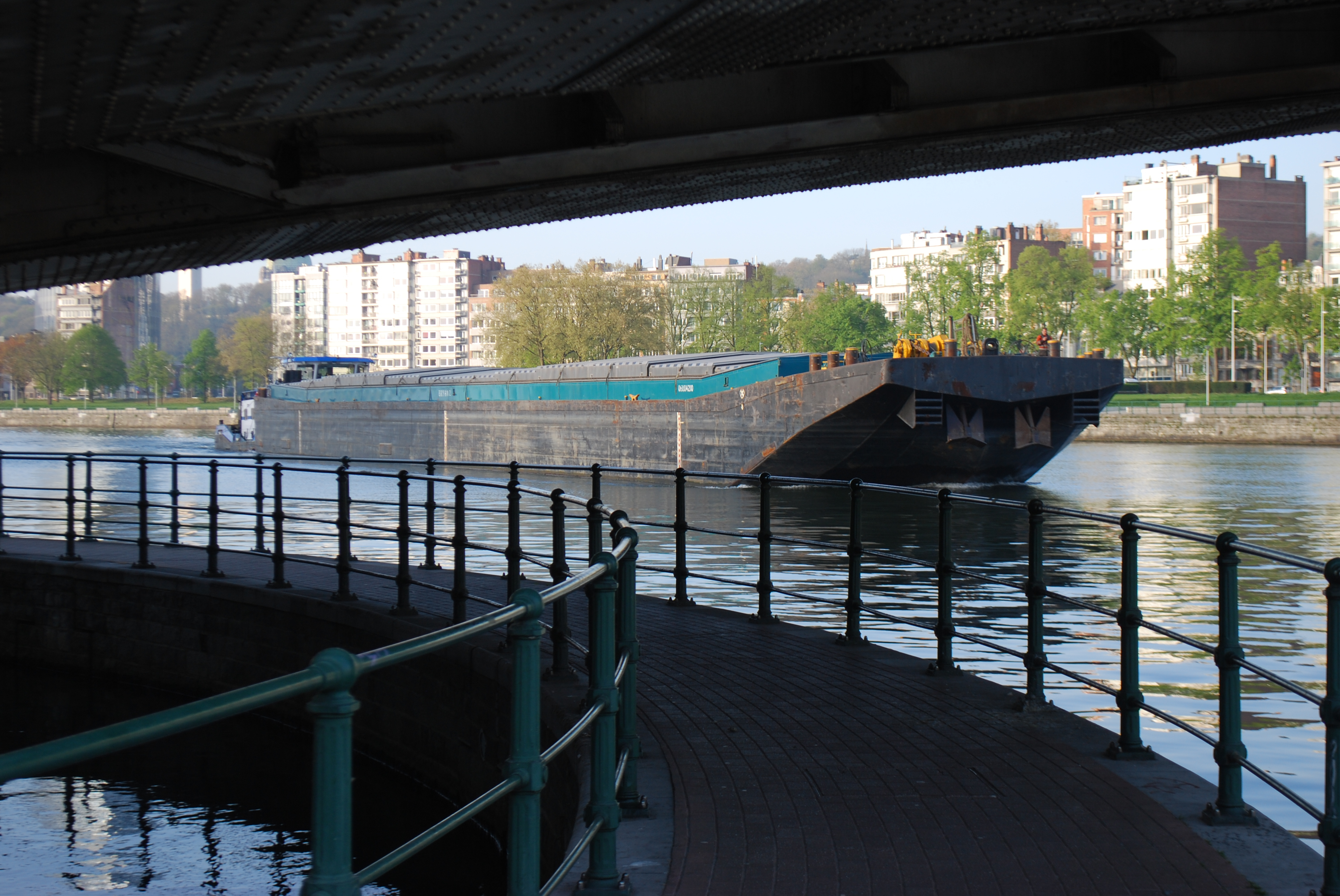 Vue du pousseur "Aries" sur la Meuse à Liège, à hauteur du pont Albert Ier.